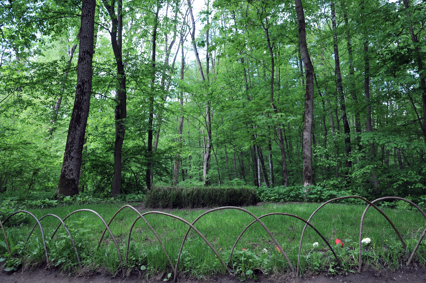 La tomba di Lev Tolstoj a Jasnaja Poljana impressionante per la sua semplicità.